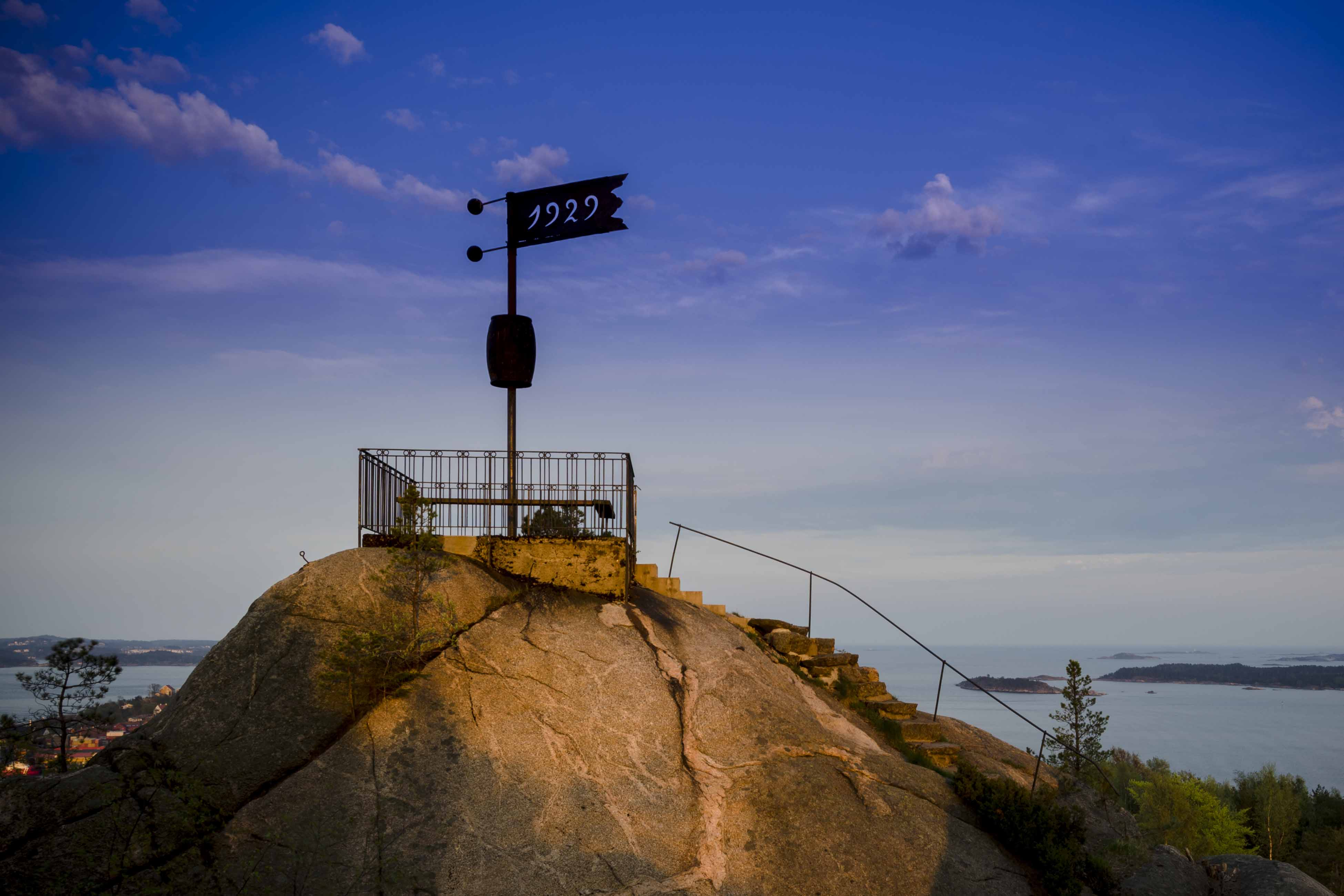 Dueknipen fotografert i solnedgang